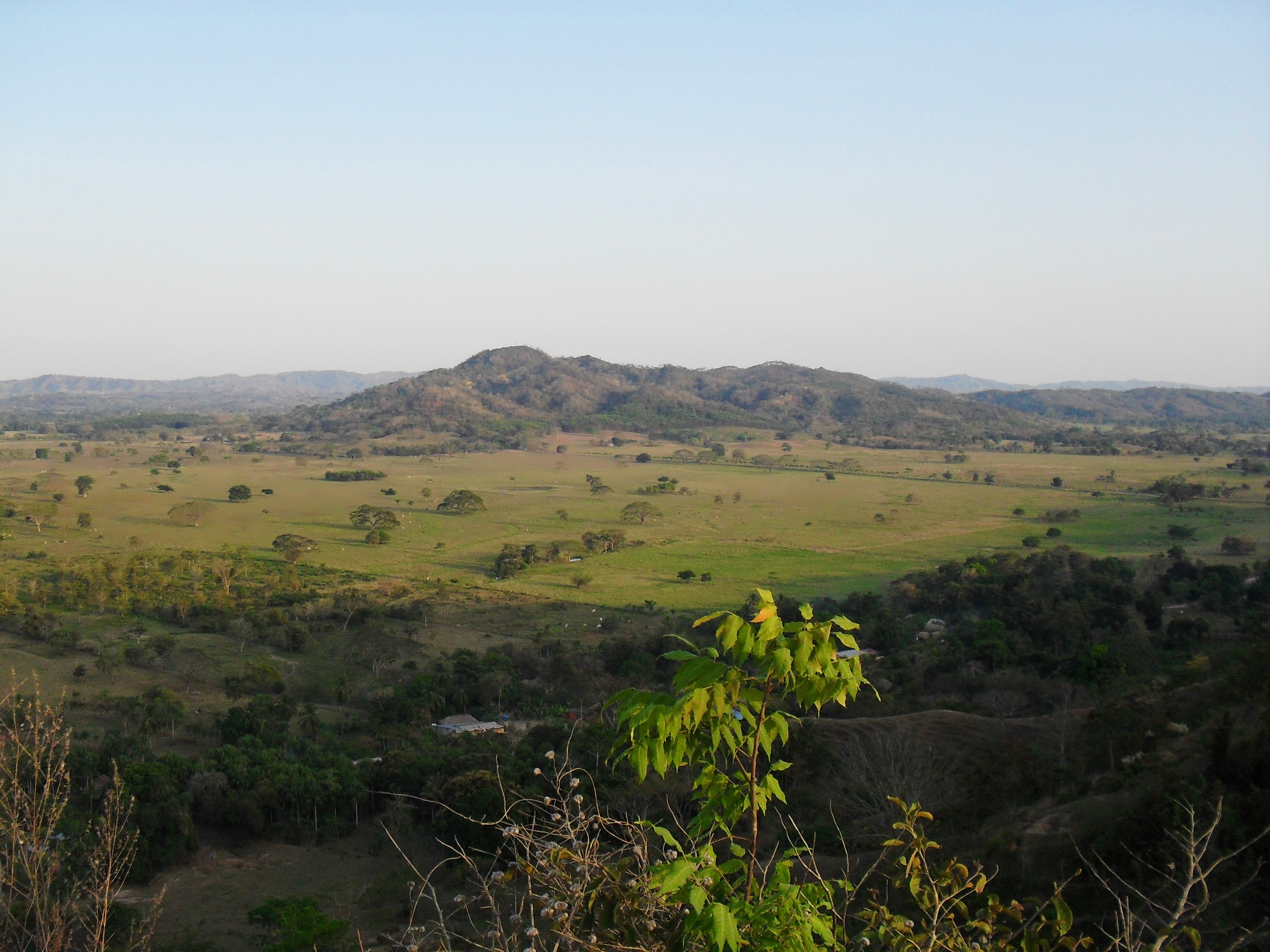 Cerro donde se encuentran las cuevas que llevan el mismo nombre Manchego.